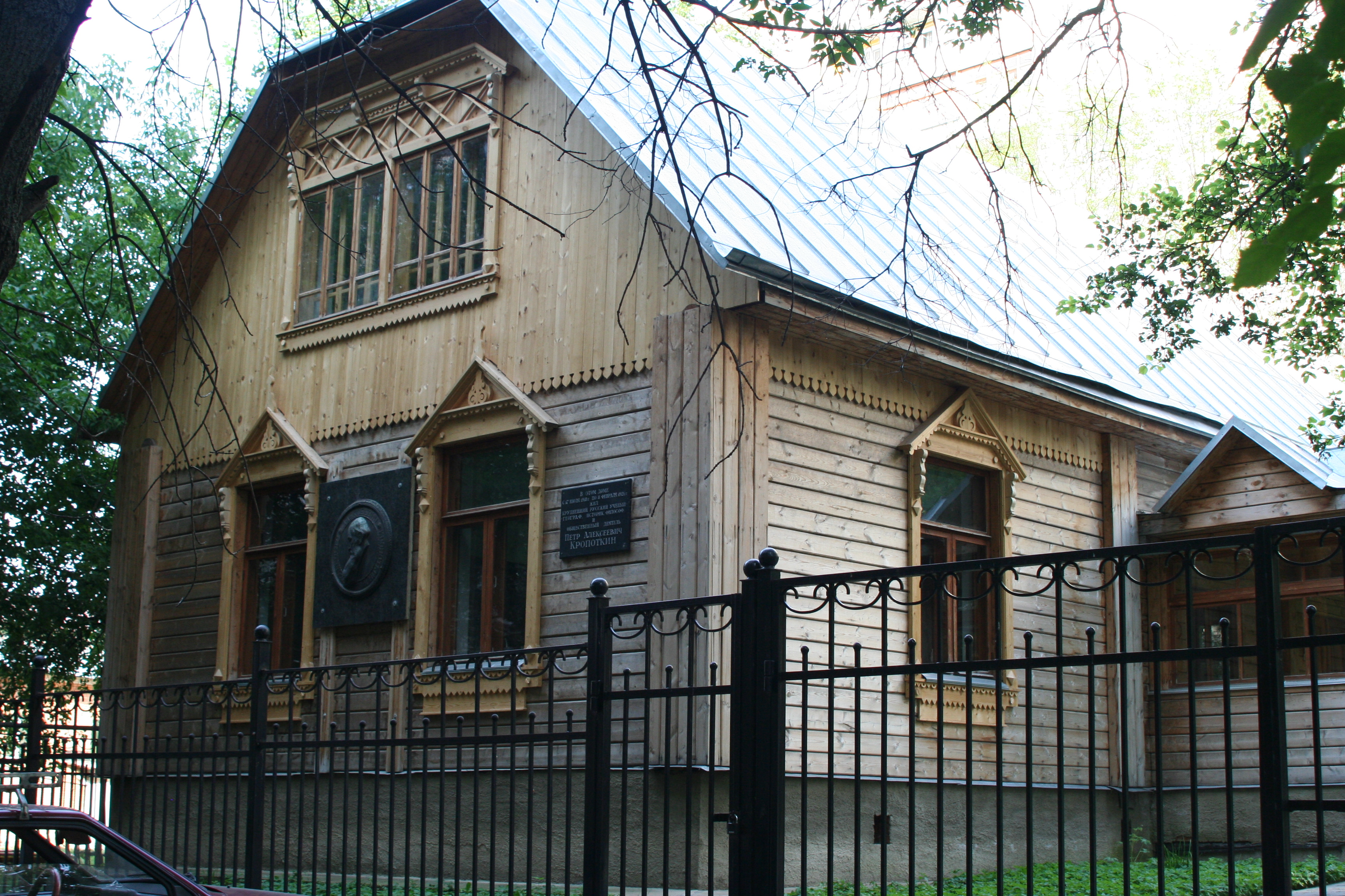 Дом Кропоткина П. А., в котором он жил в 1916—1921 гг. (дом Олсуфьева) (Москва и Московская область, Дмитров, Кропоткинская улица, 95)